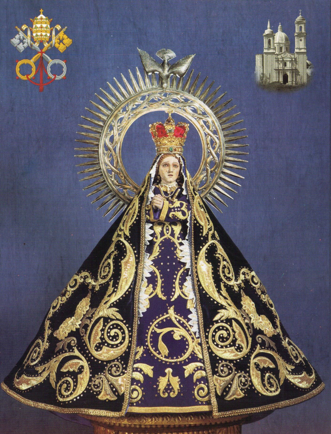 Virgen de Soriano, patrona de la Diosesis de Queretaro